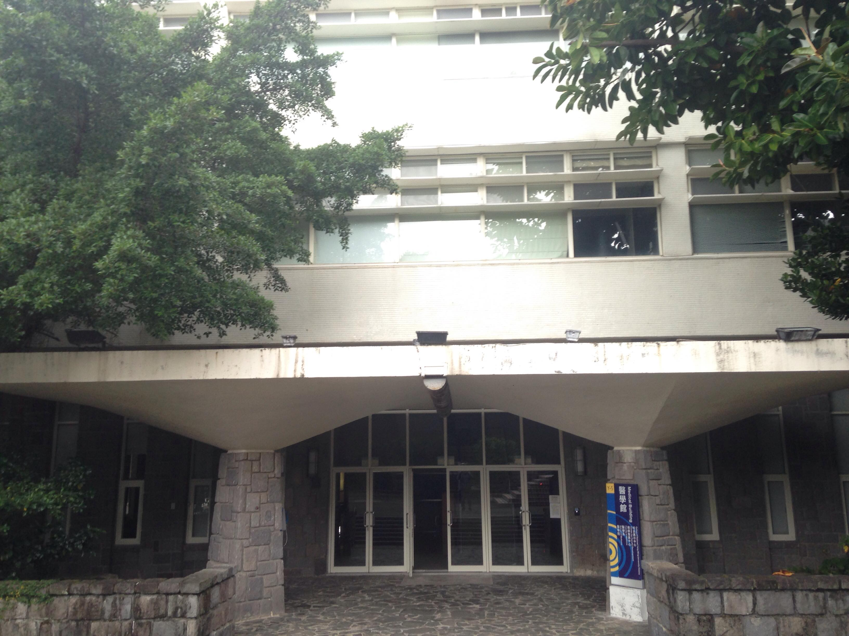 國立陽明大學醫學館